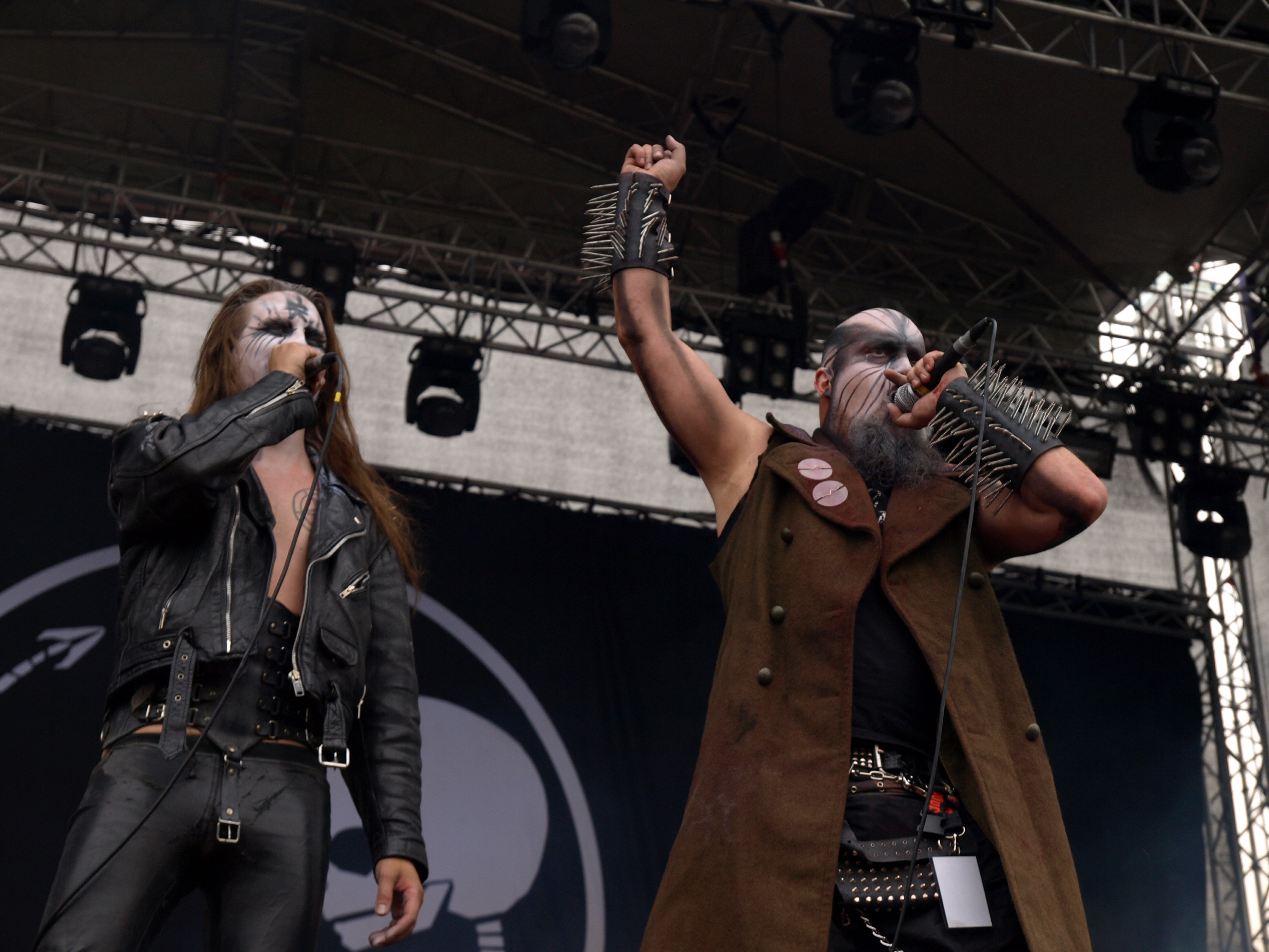 Turmion Kätilöt live am Myötätuulirock 2011